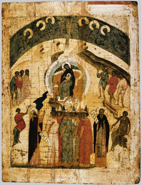 Собор Богоматери Школа или худ. центр: Ростово-Суздальская школа Середина XV в. 85 × 66 см Дом-музей П. Д. Корина (филиал ГТГ), Москва, Россия)